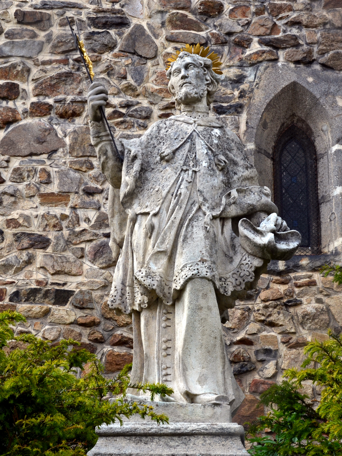 Sv. Jan Nepomucký, Kostel svatého Jakuba Staršího, Jihlava